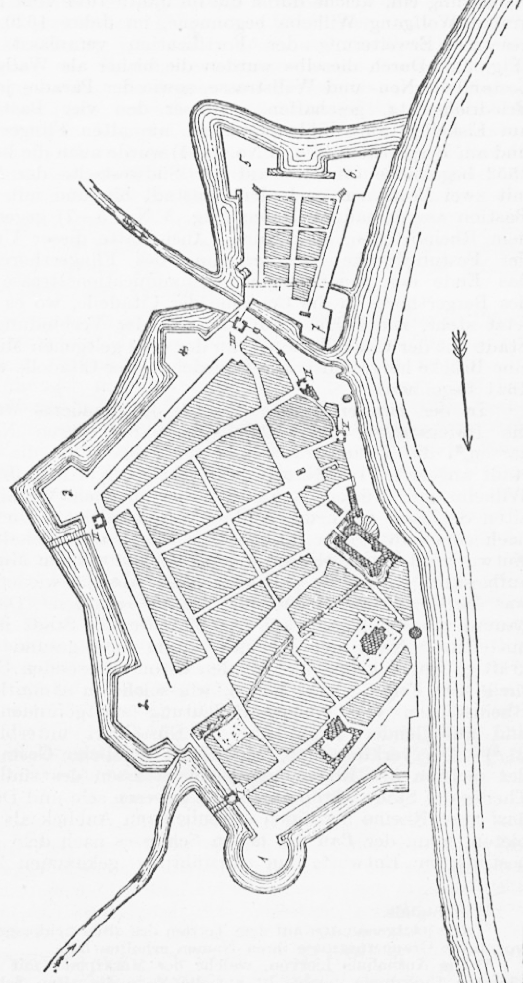 Plan von Düsseldorf im Jahr 1620, gesüdete Version